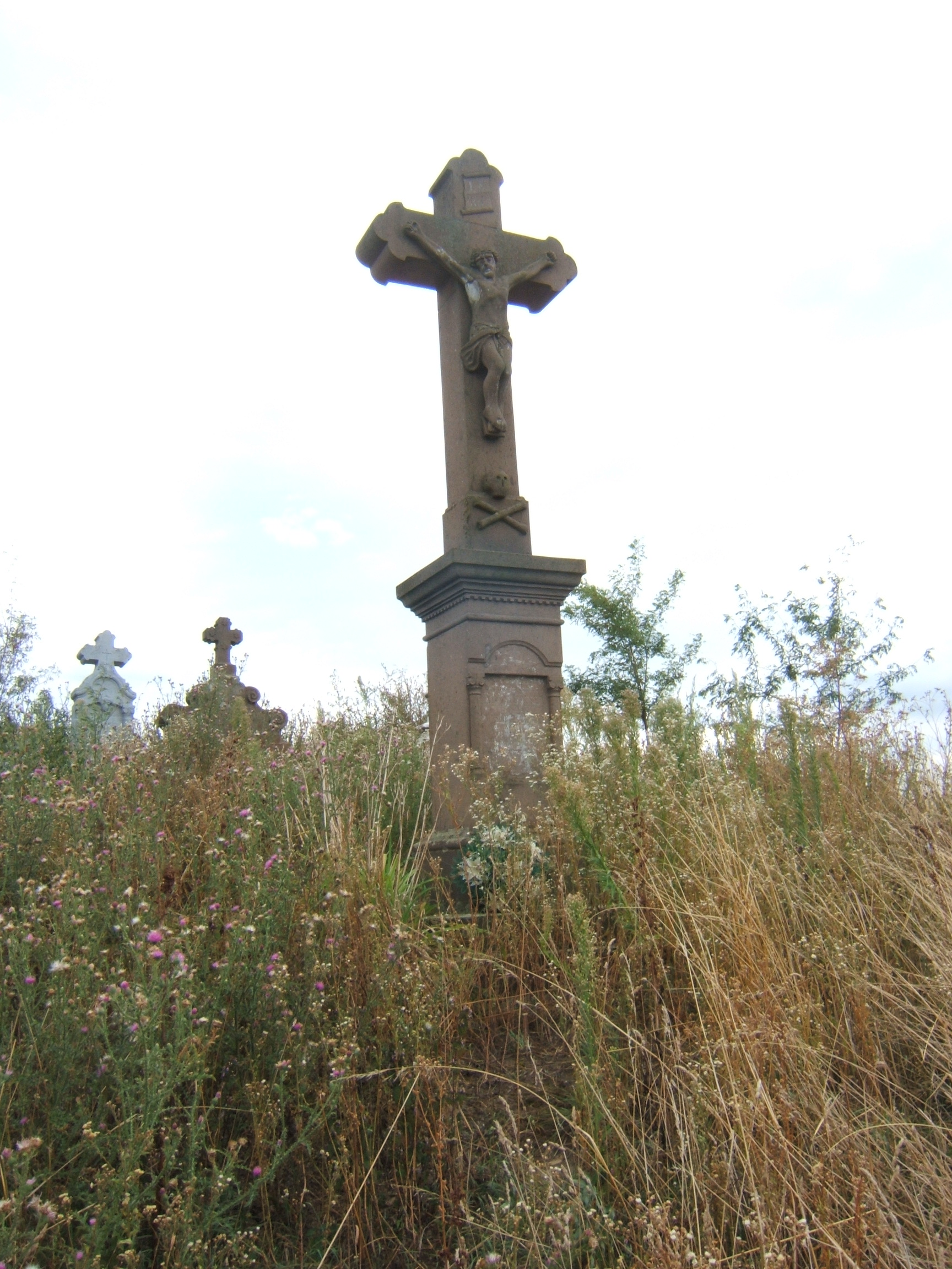 Kereszt a Szöghatár-halmon